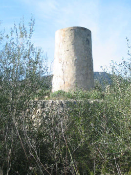 Molí de Binilagant Vell (possessió de Llucmajor, Mallorca)